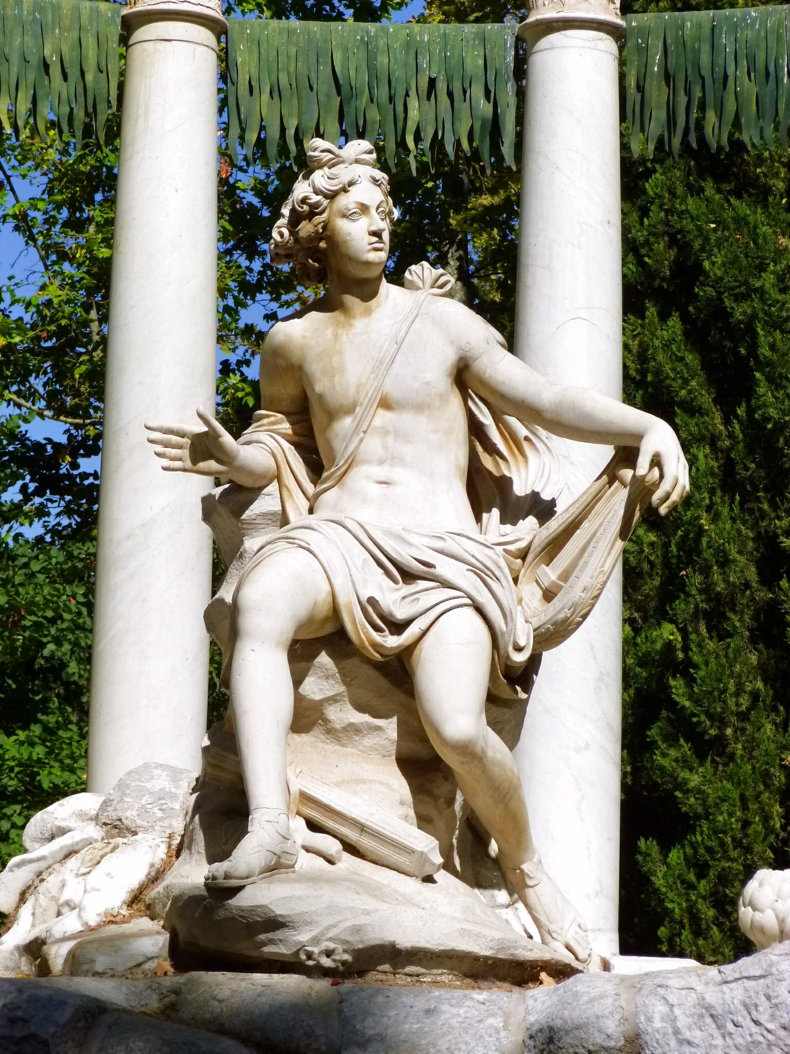 Fuente de Apolo, Jardín del Príncipe, Real Sitio de Aranjuez